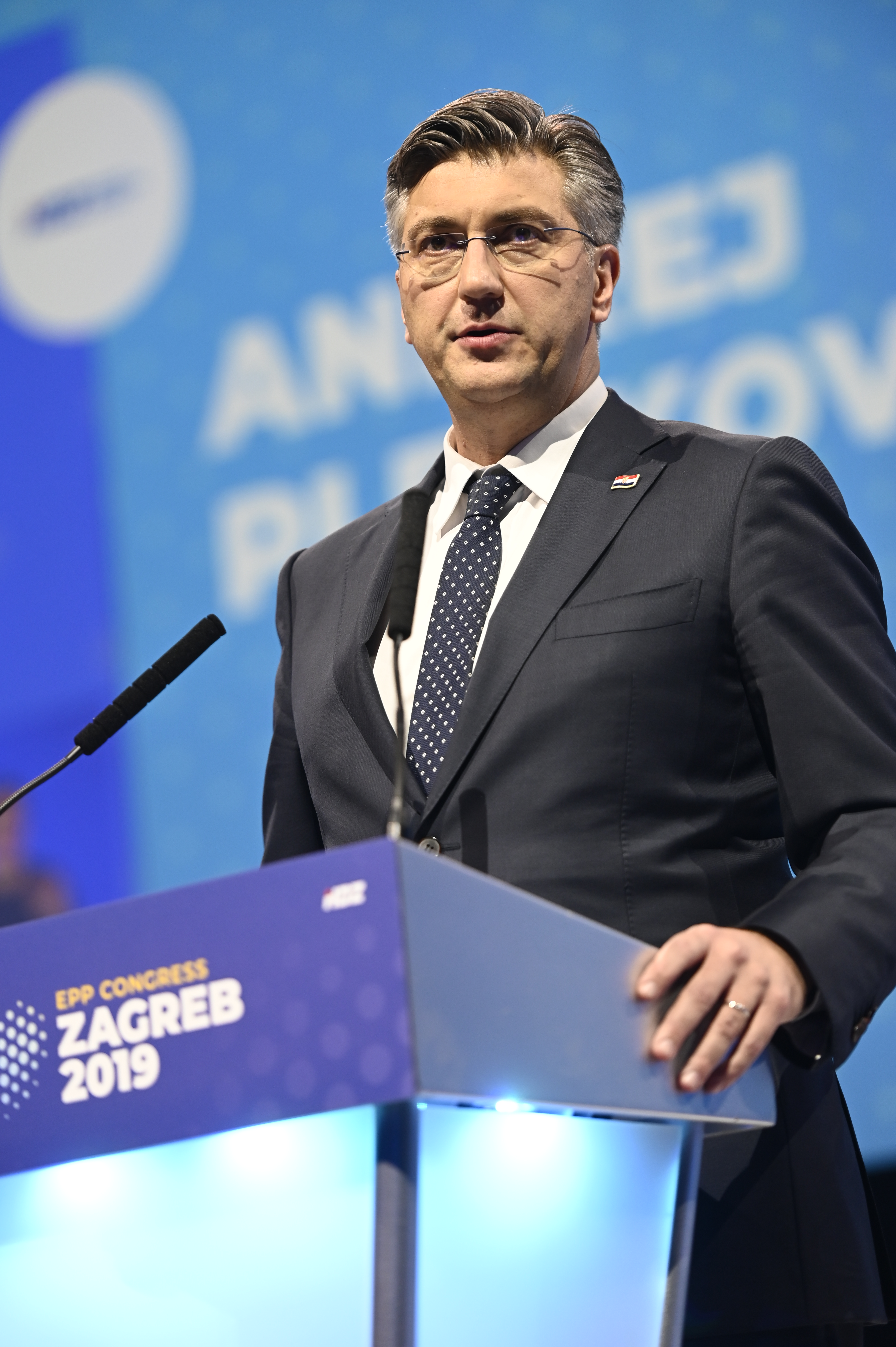 20-21 November 2019